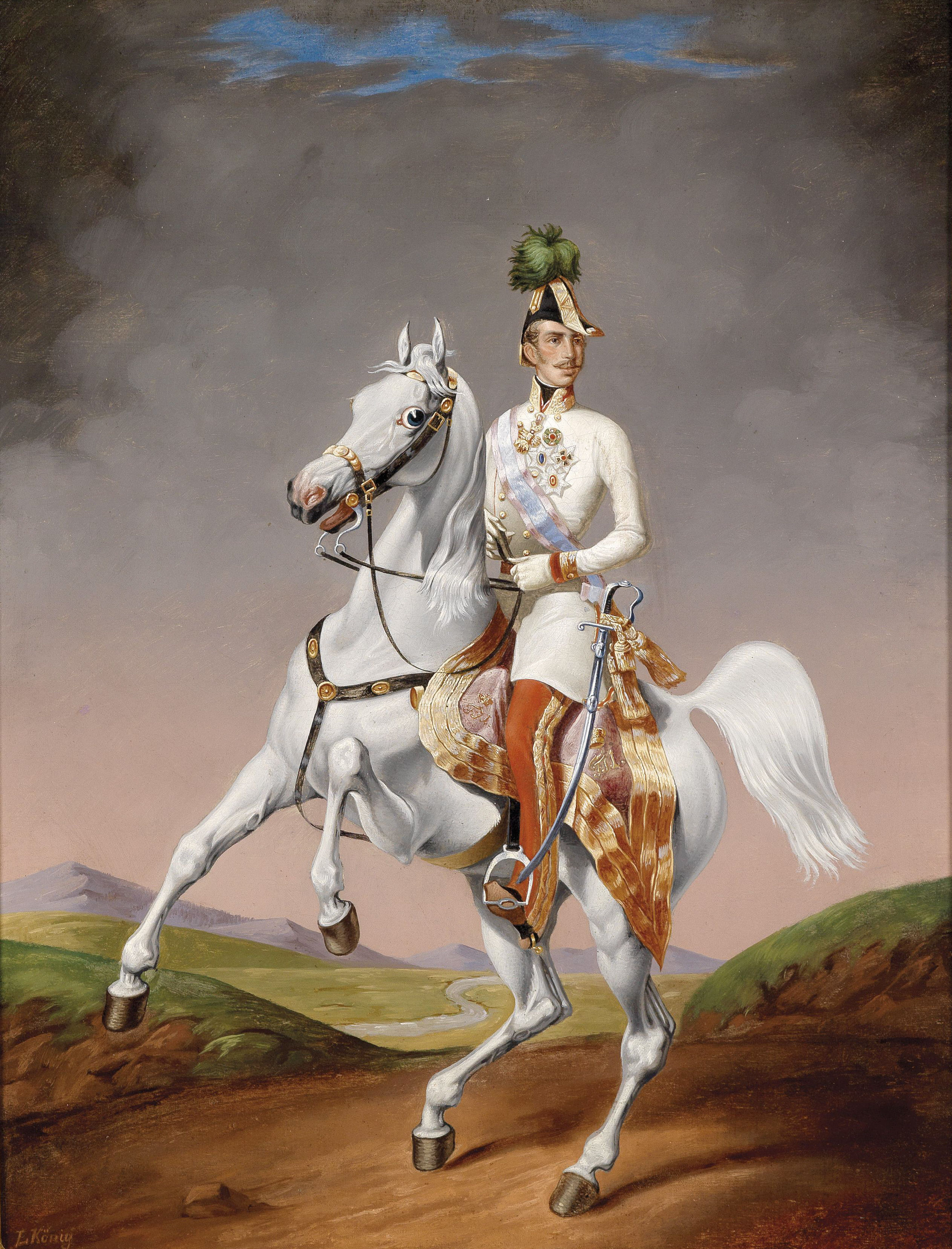 signiert und datiert "L. König 1855", rückseitig bezeichnet: "Andenken von Herrn Rittmeister V. Dabsch 1856".